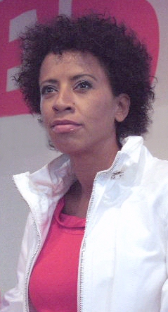 Arabella Kiesbauer Aufnahme: 12.10.2007 Url